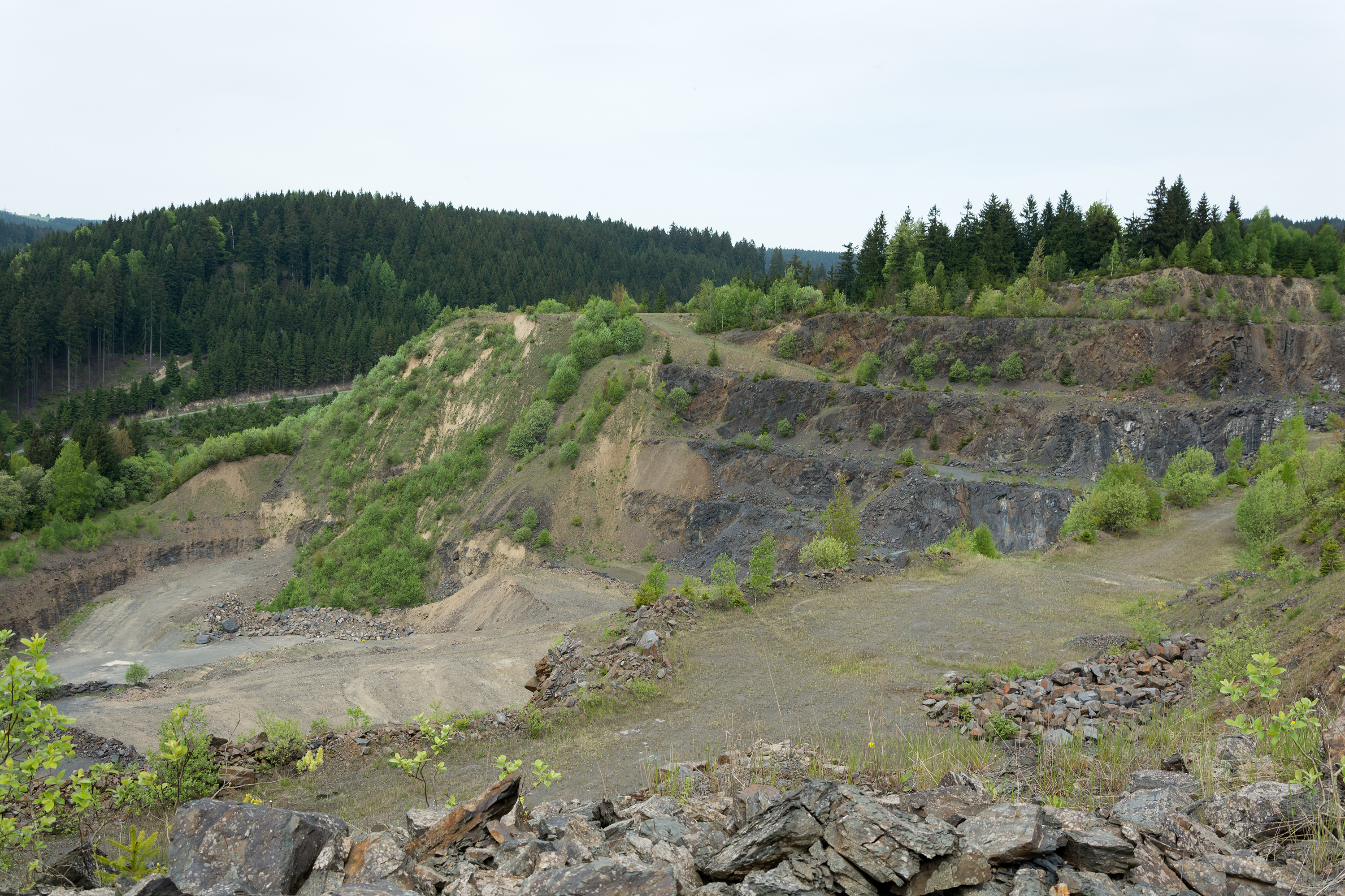 Ehemaliger Steinbruch nördlich von Förtschendorf.